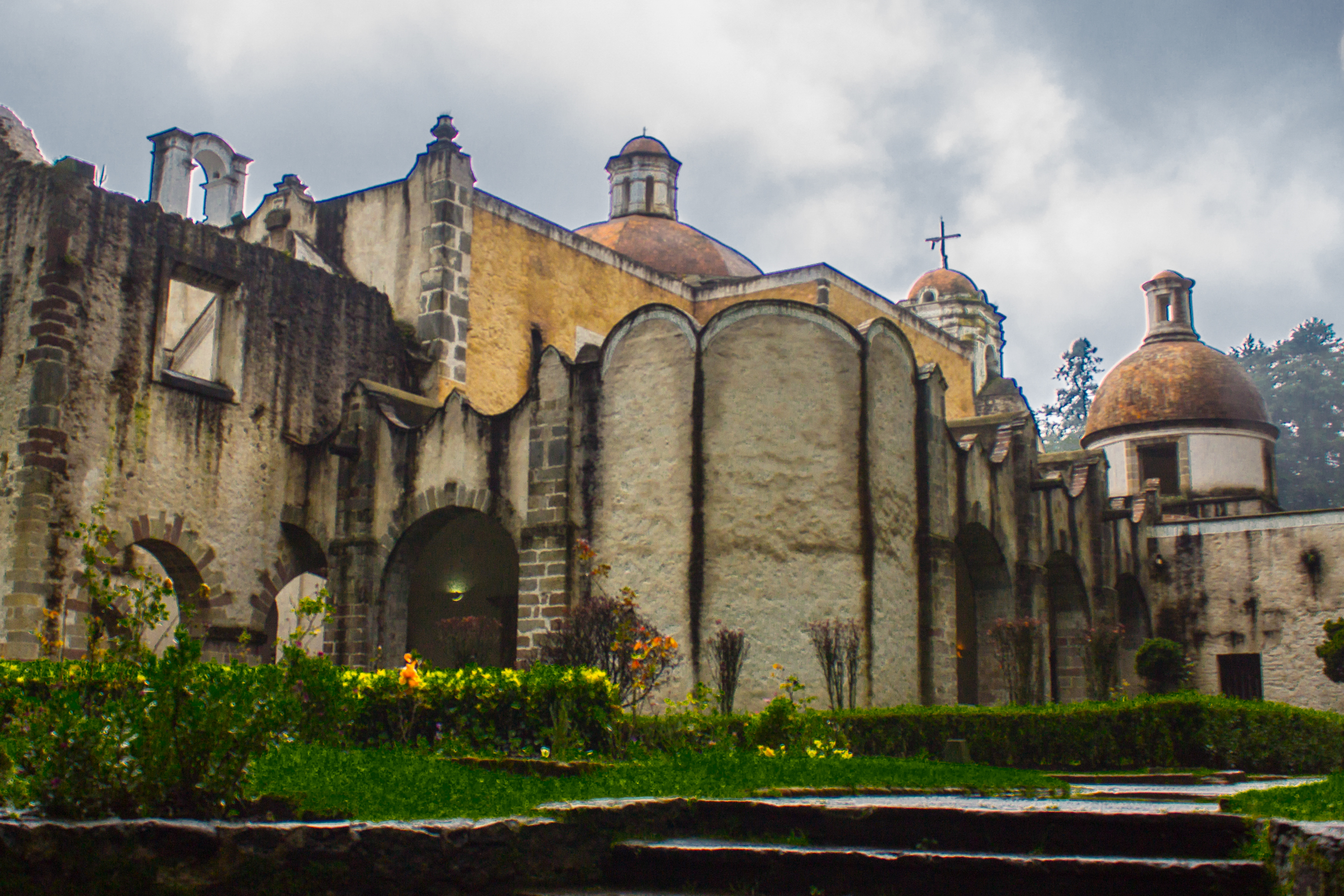 Esta foto fue tomada desde el jardín. En este convento vivían monjes Carmelitas. Conserva mucho de su originalidad como lo son las celdas y los oratorios. También permanece intacto el sótano.